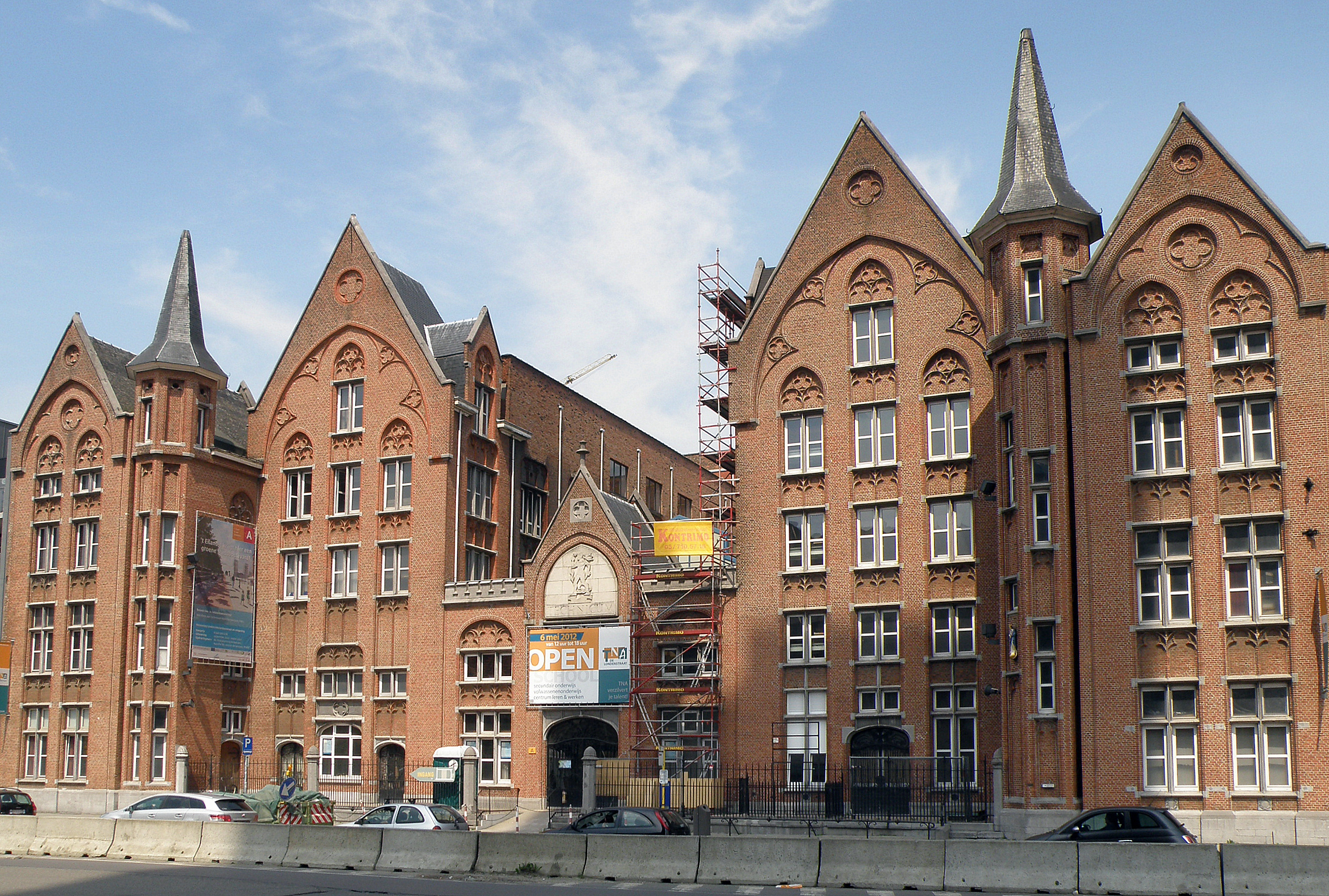 Antwerpen (België). Technicum Noord-Antwerpen (beroepssecundaire school), neogotisch gebouw aan de Londenstraat (1898).